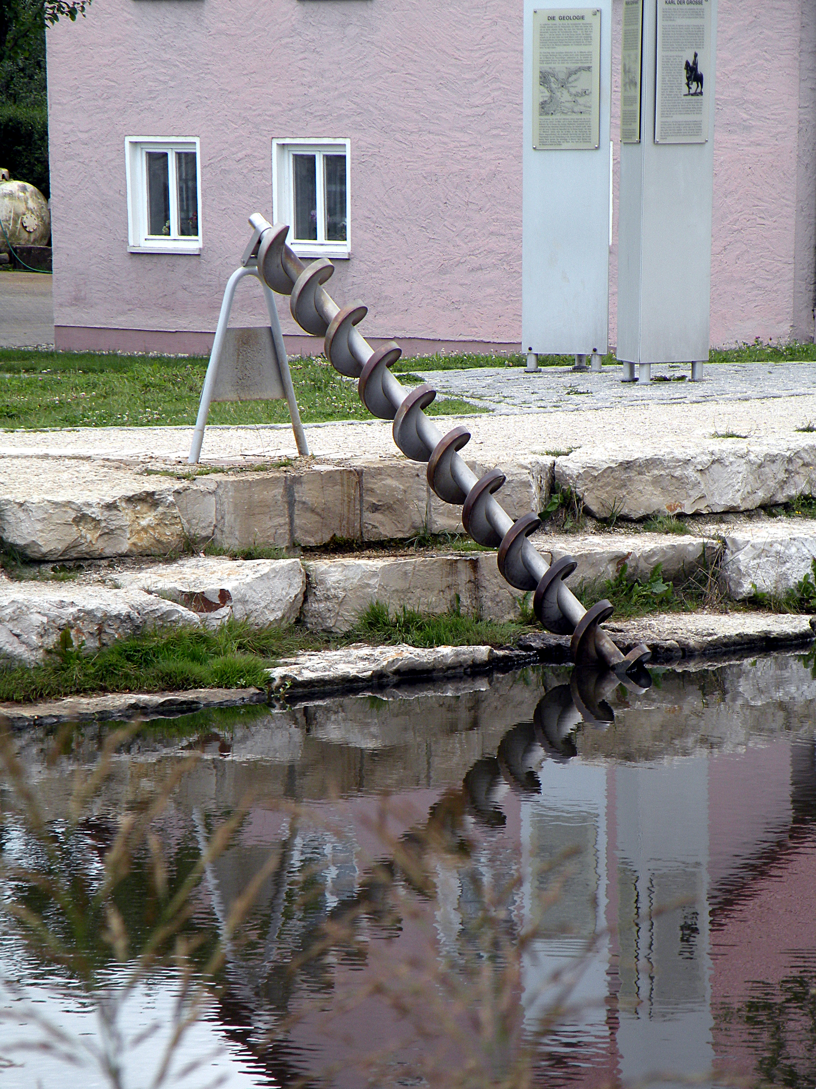 Fossa Carolina.Fossa Carolina. Archimedes' screw